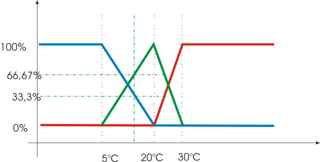 Fuzzy príklad 2